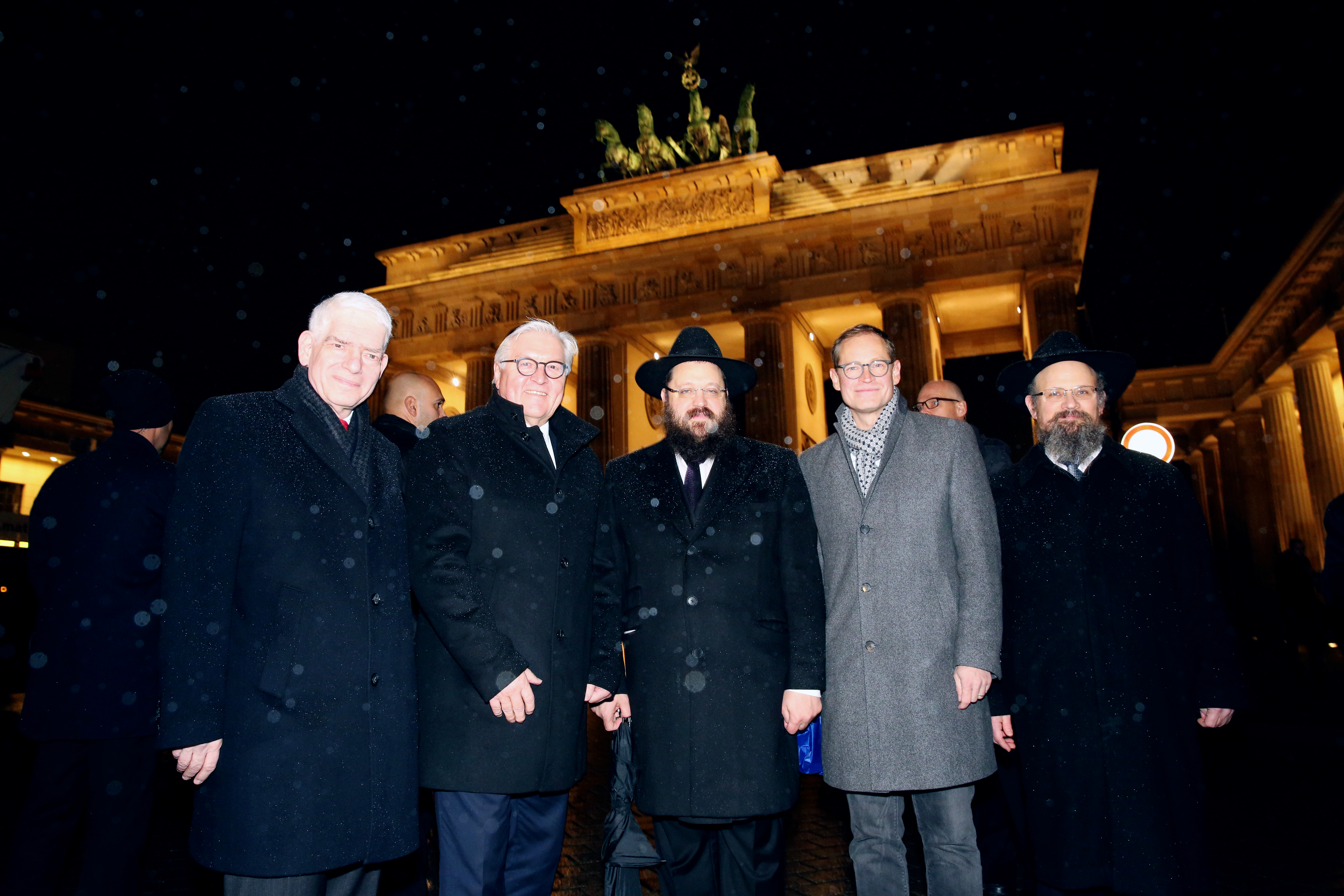 Chanukka Lichterzünden 2018